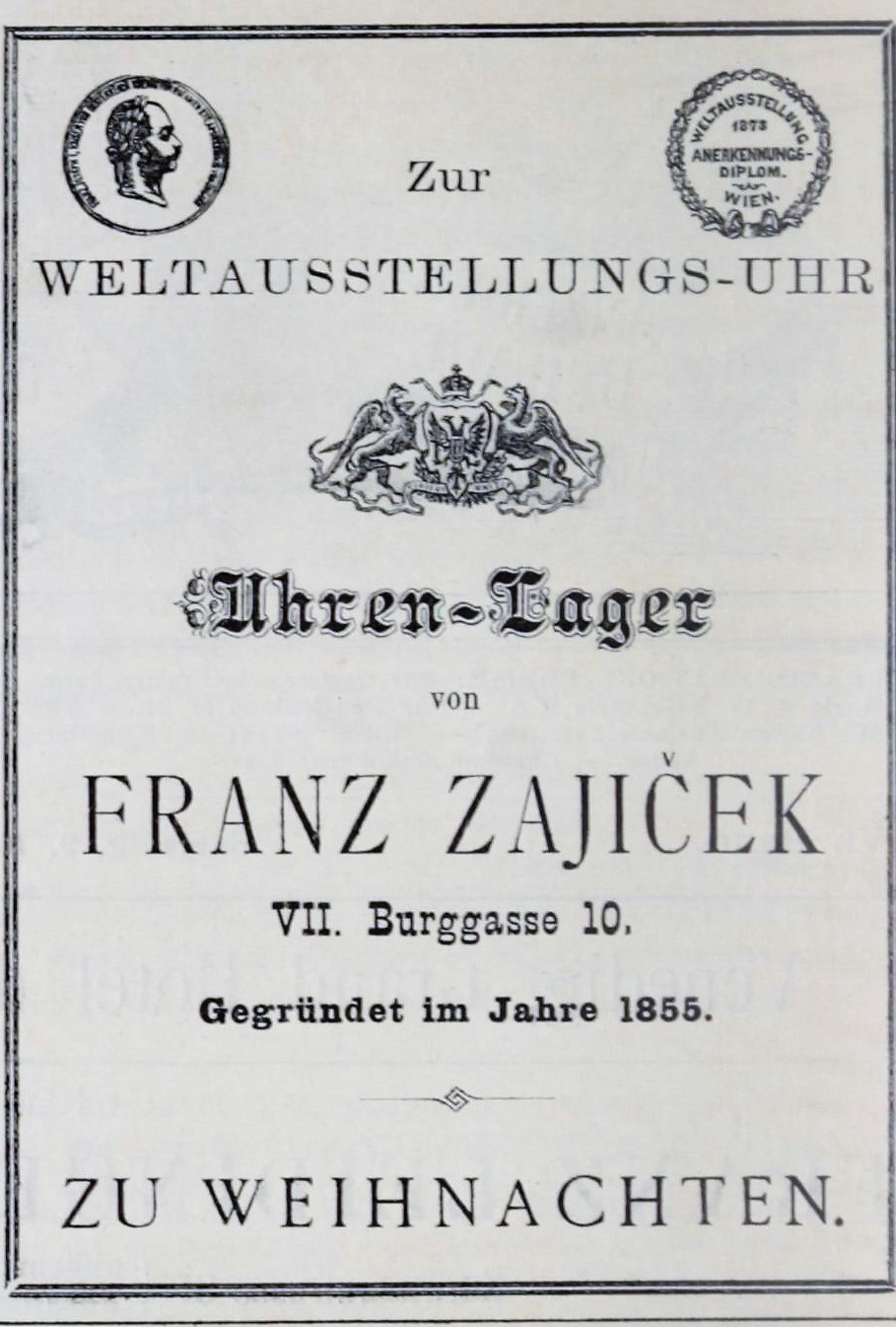 Annonce des Uhrmachers Franz Zajicek, in: Allgemeine Kunst-Chronik Zeitschrift für Kunst, Kunstgewerbe und Literatur, 9. Dezember 1882